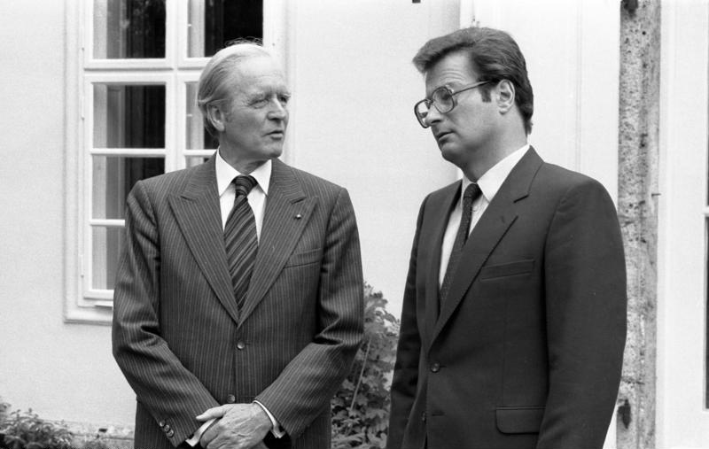 Bundespräsident Karl Carstens besucht Bundesnachrichtendienst in Pullach